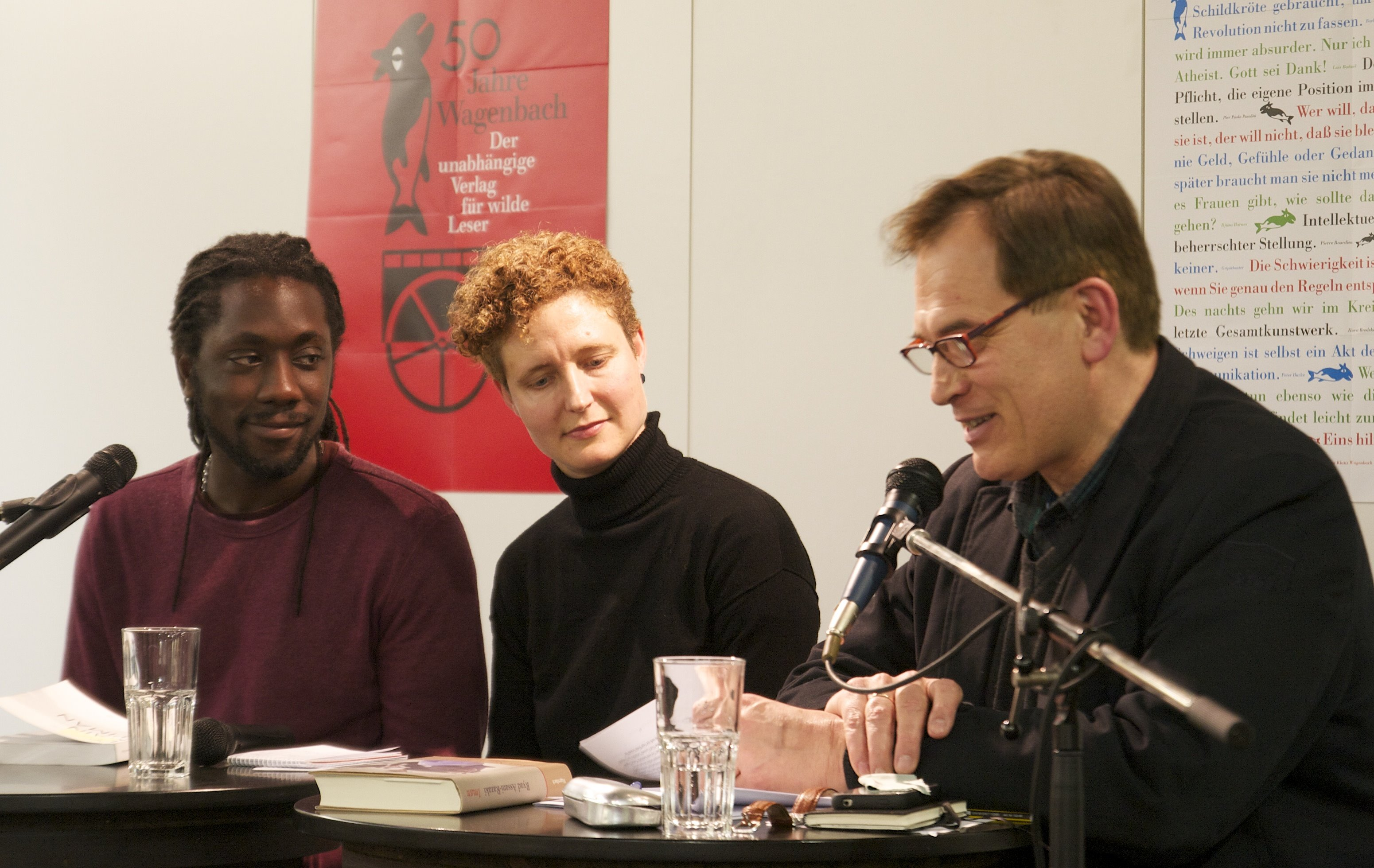 Ryad Assani-Razaki (Schriftsteller), Sonja Finck (Literaturübersetzerin), David Eisermann (Moderator), Autorenlesung im Heine Haus Düsseldorf am 19. März 2014